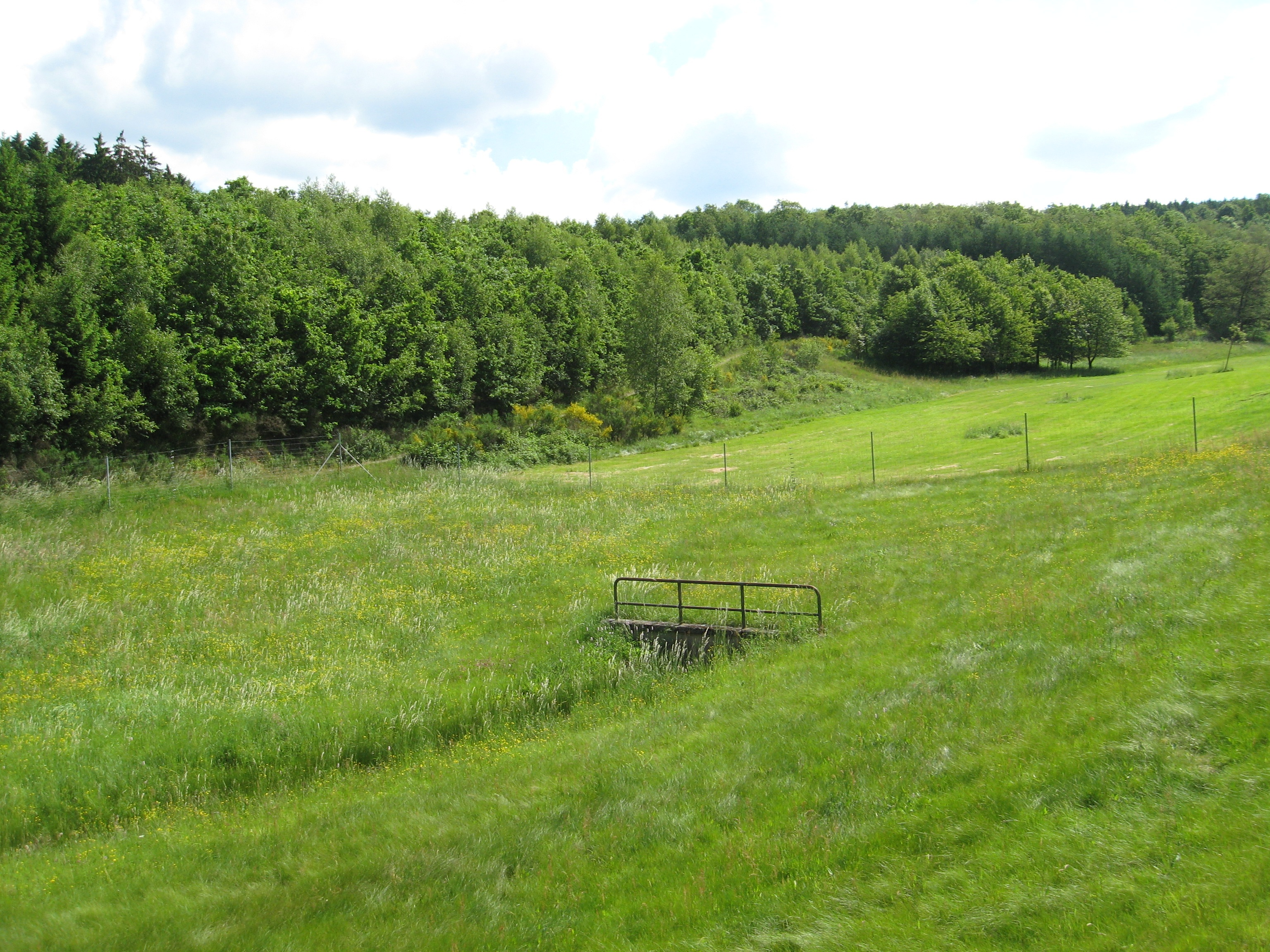 Ehemaliges Grubengelände der Grube Landeskrone bei Wilden / Siegerland